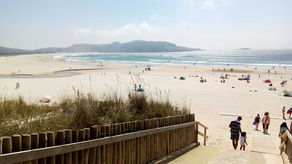 Praia da Esmelle, Ferrol.